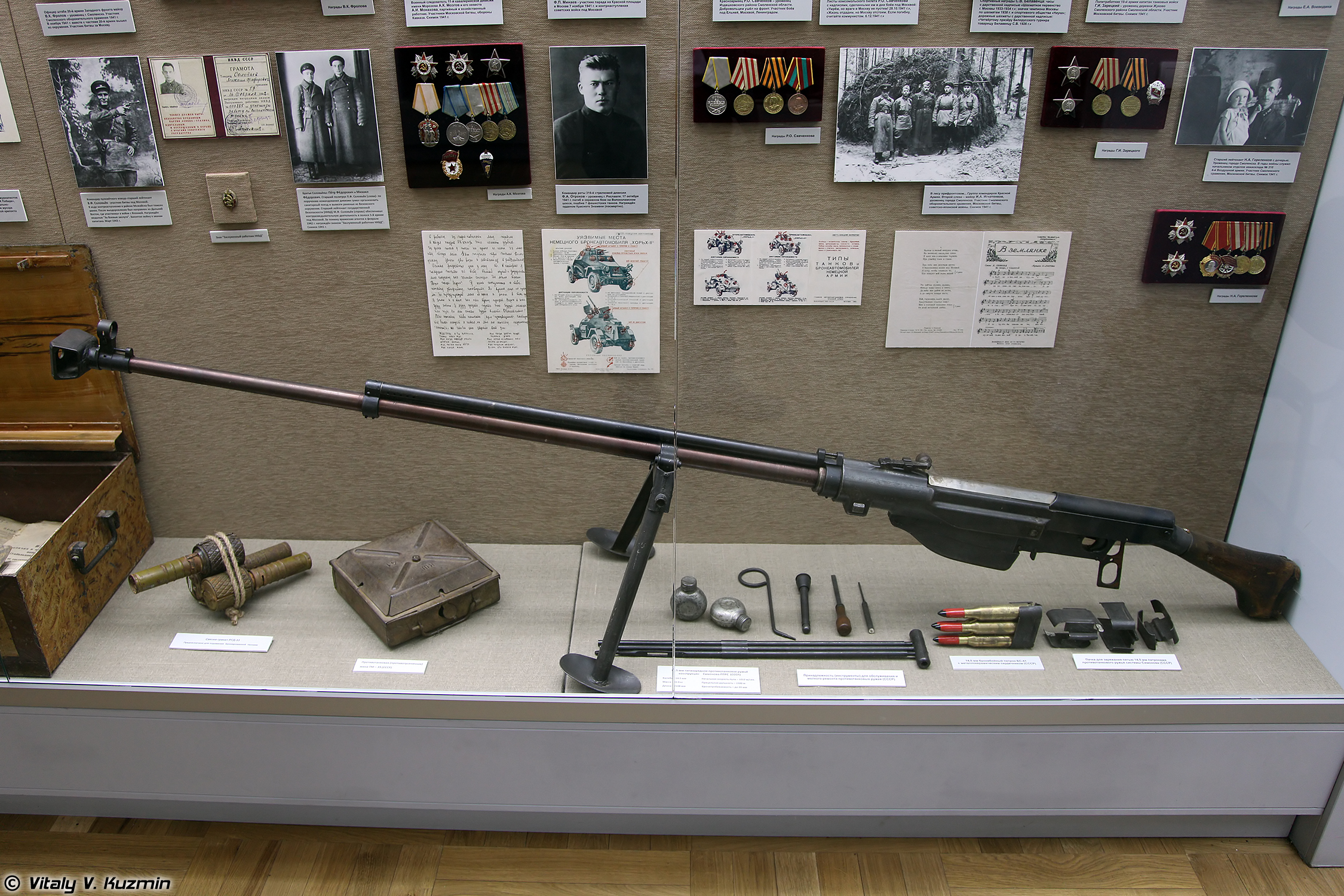 ПТРС (PTRS rifle)